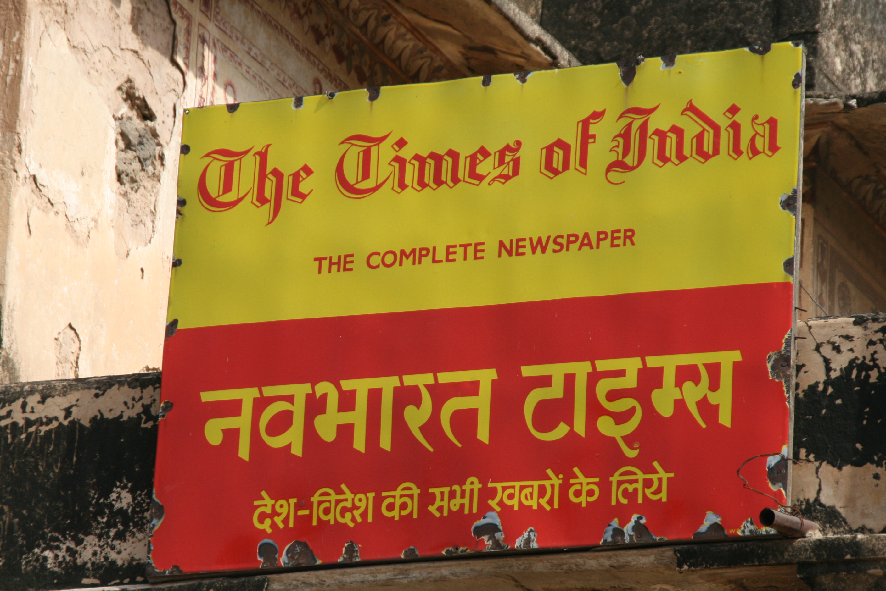 Publicité pour le journal dans les rues de Mandawa (Shekhawati)